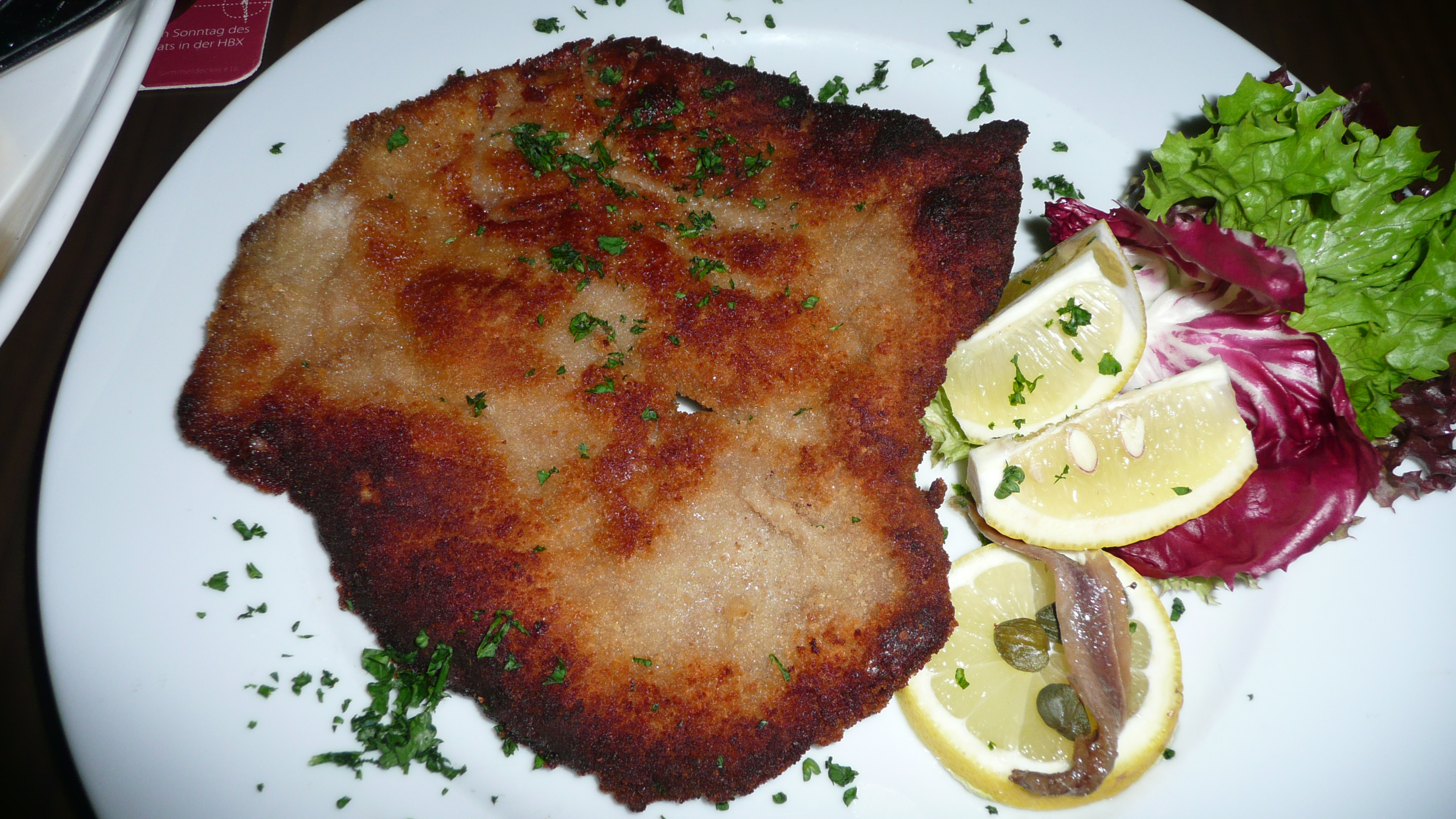 Original Wiener Schnitzel mit Kapern und Sardellen, Brauhaus HBX Hannover